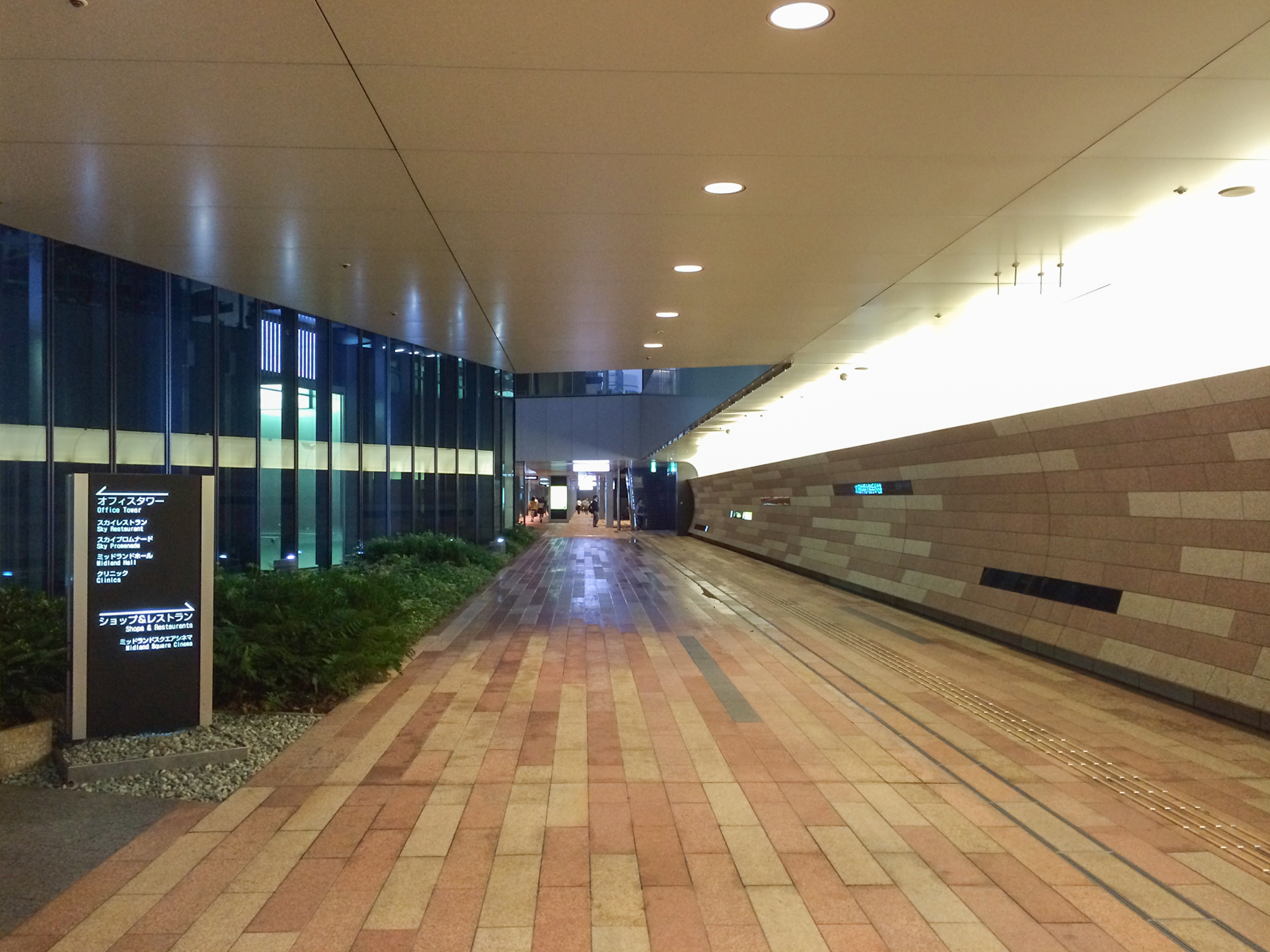 Midland Square Basement Entrance